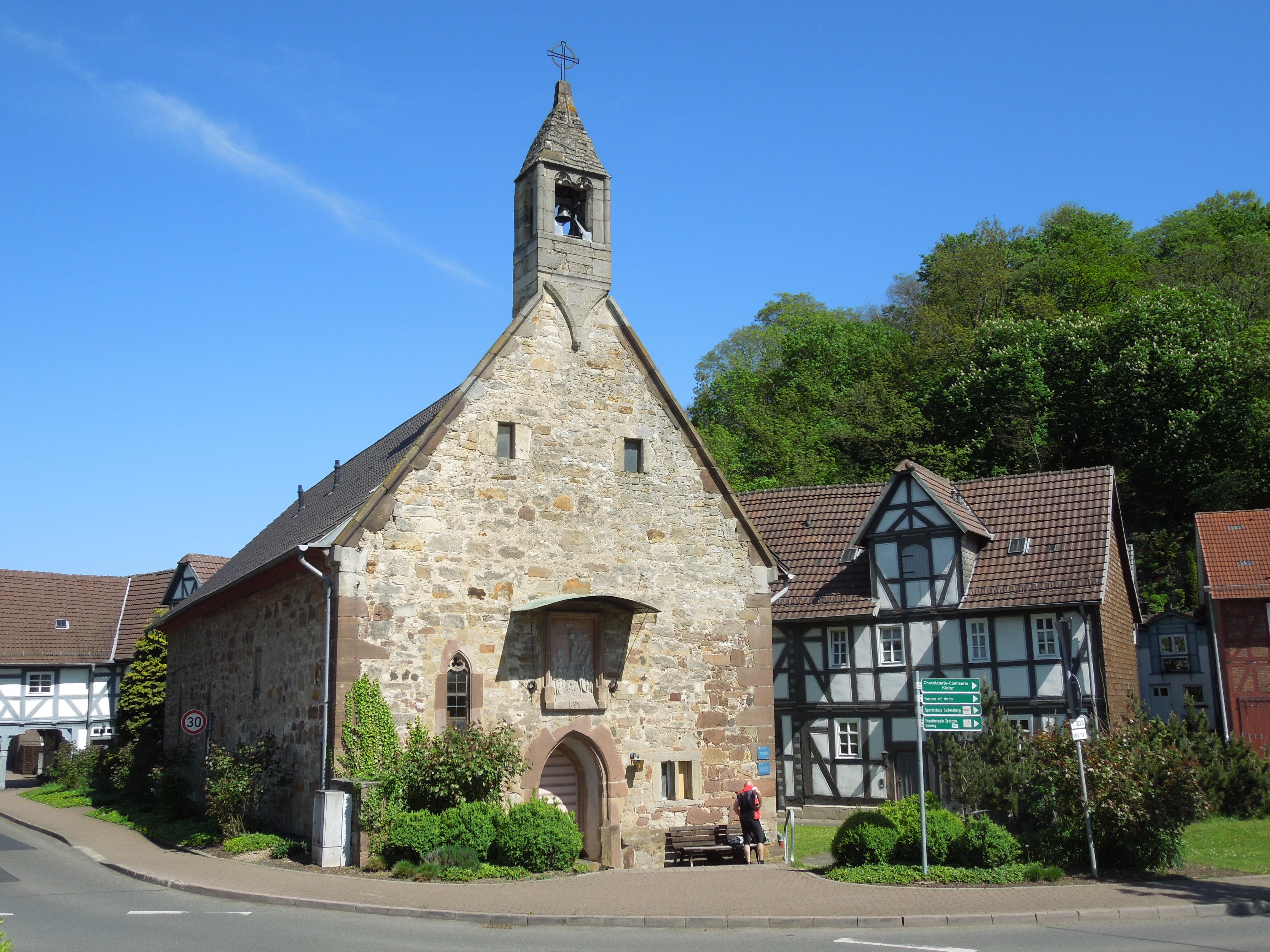 Die Kapelle des ehemaligen Hospitals in Gudensberg; rechts und links Teile der im 18. Jahrhundert errichteten Erweiterungsbauten des ehemaligen Hospitals und Altenheims